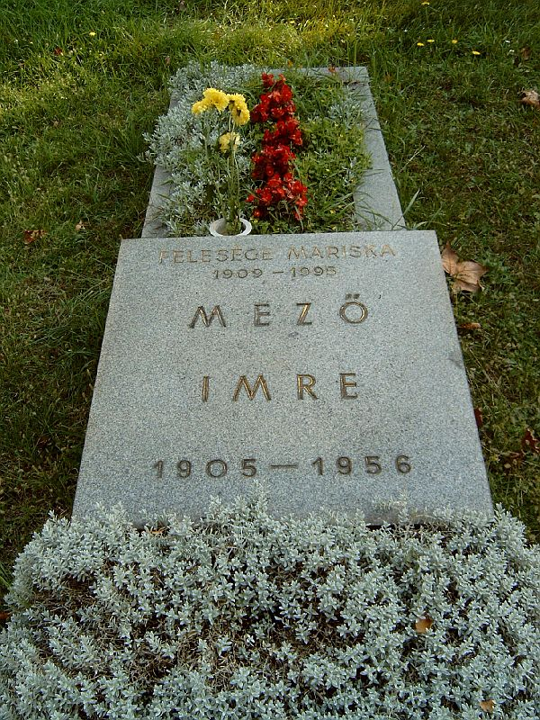 Mező Imre (Ramocsaháza, 1905. dec. 13. – Bp., 1956. nov. 1.) szakszervezeti vezető sírja Budapesten. Kerepesi temető: Mm. J.3.